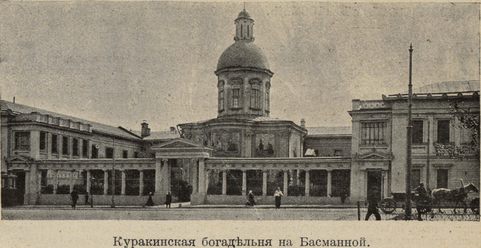 Богадельня Куракиных на Новой Басманной